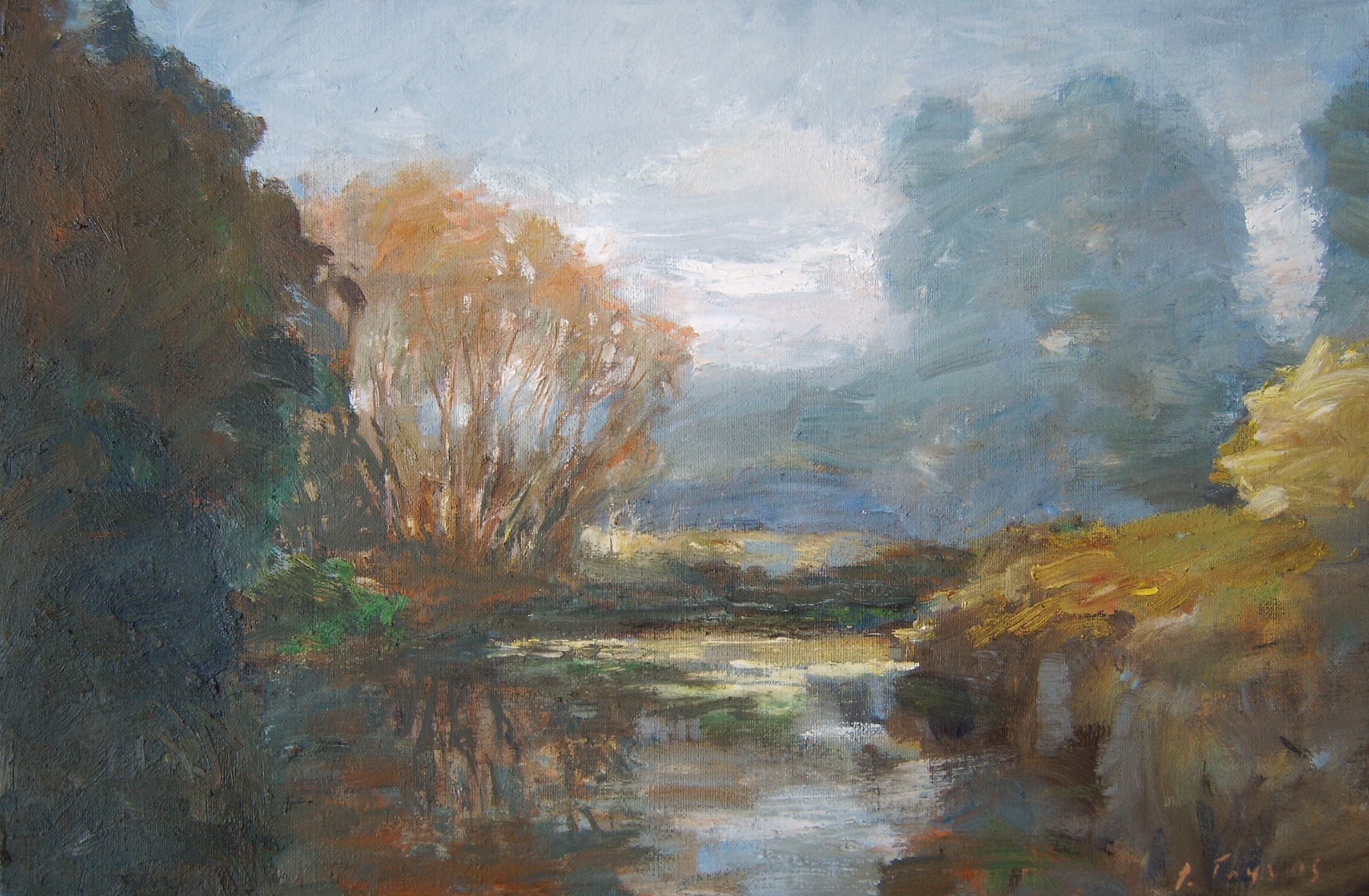 landschap Dommel 40x60cm olieverf op doek